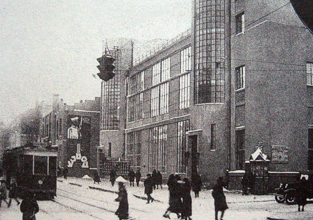 У гэтым будынку на вугле вул. Савецкай і Ленінскай да вайны знаходзілася Беларуская кантора Дзяржаўнага банка СССР, 1932 г.